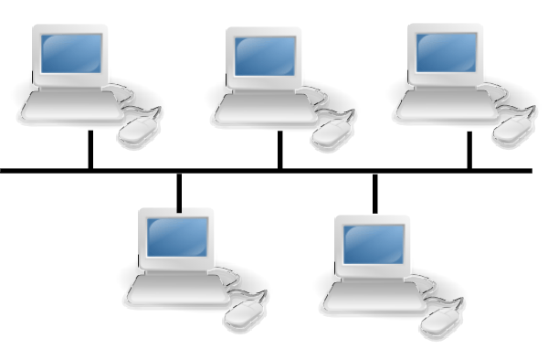 Debuxo realizado a partir de e